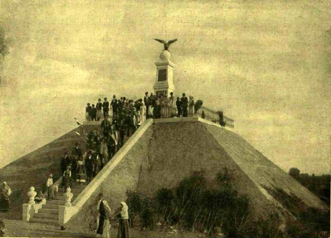 A tiszabecsi átkelés emlékműve